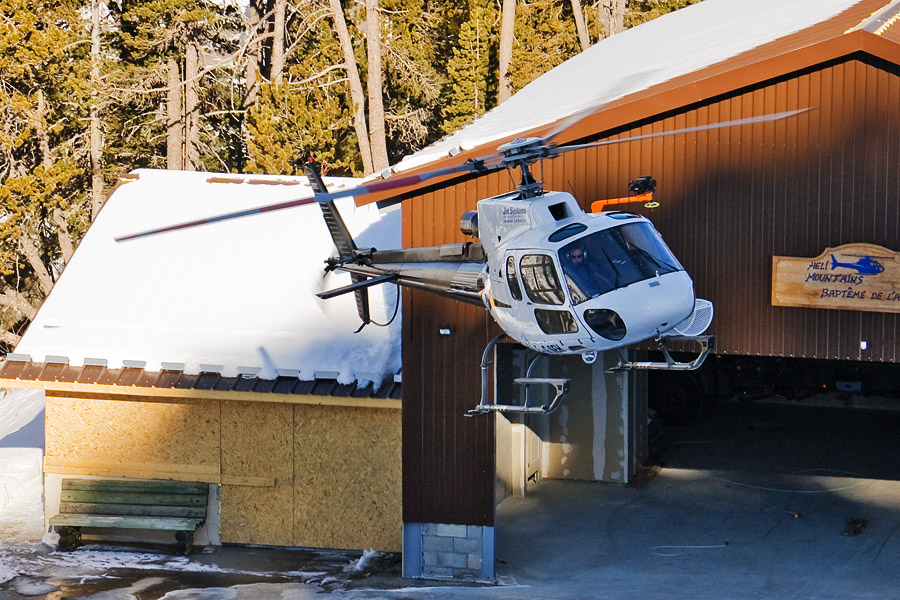 Heli-ski helicopter at Les Arcs.jpg